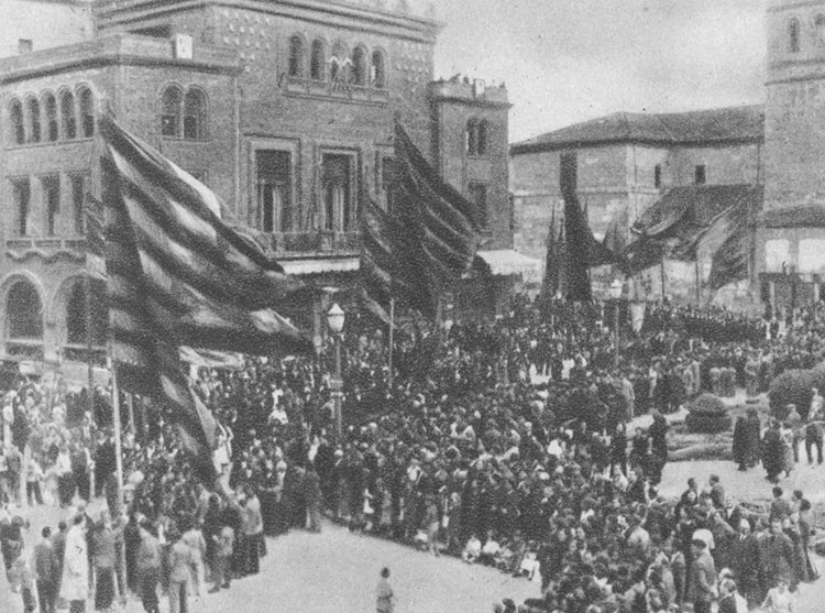 Virgen del Camino. Pendones parroquiales - León - España Turística y Monumental / Cuarto álbum / Las Bellezas de Castilla / Región Leonesa - Cromo 95 x 75 Sepia